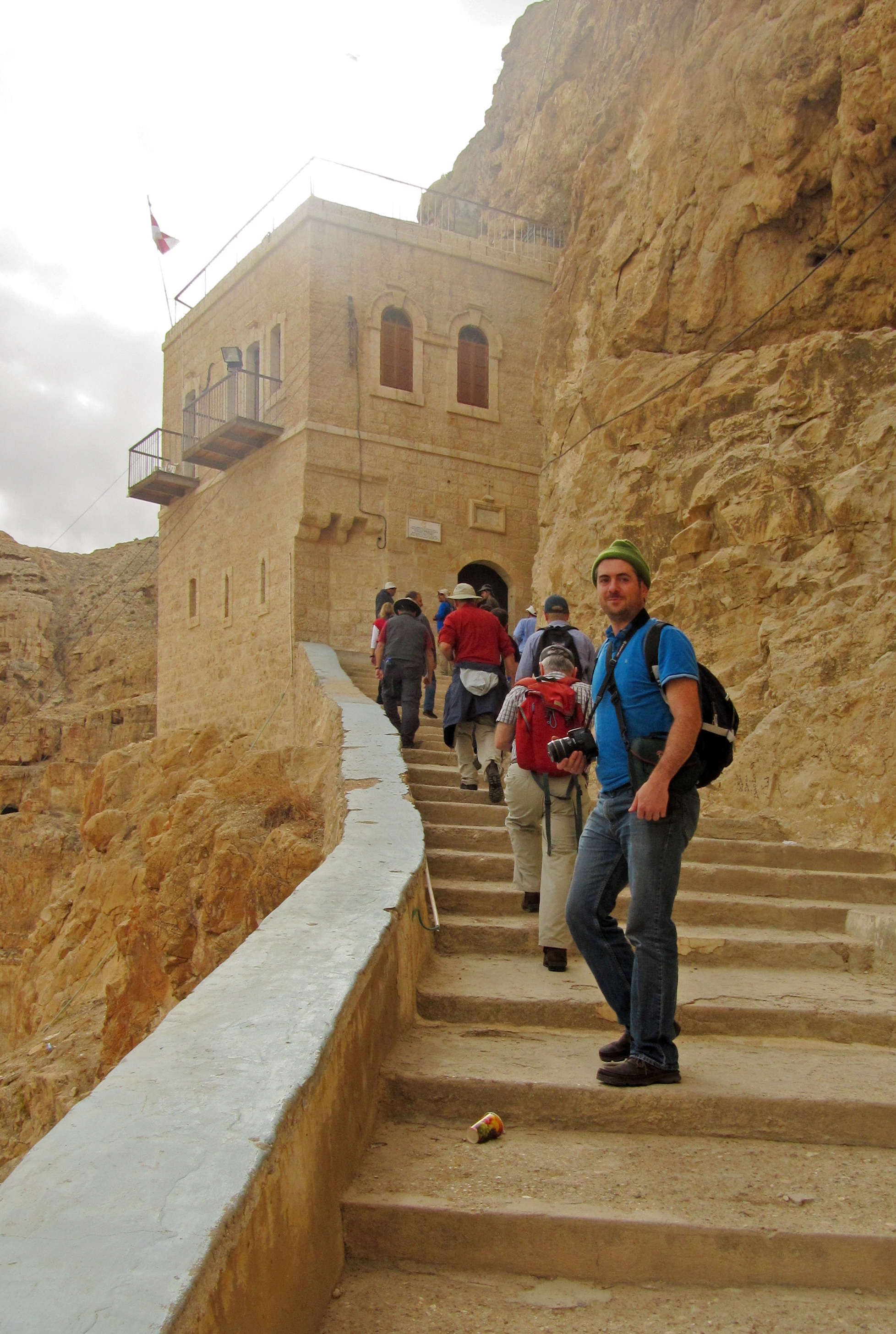 Jericho (more details in the photo's title) יריחו (מידע נוסף בשם הקובץ)